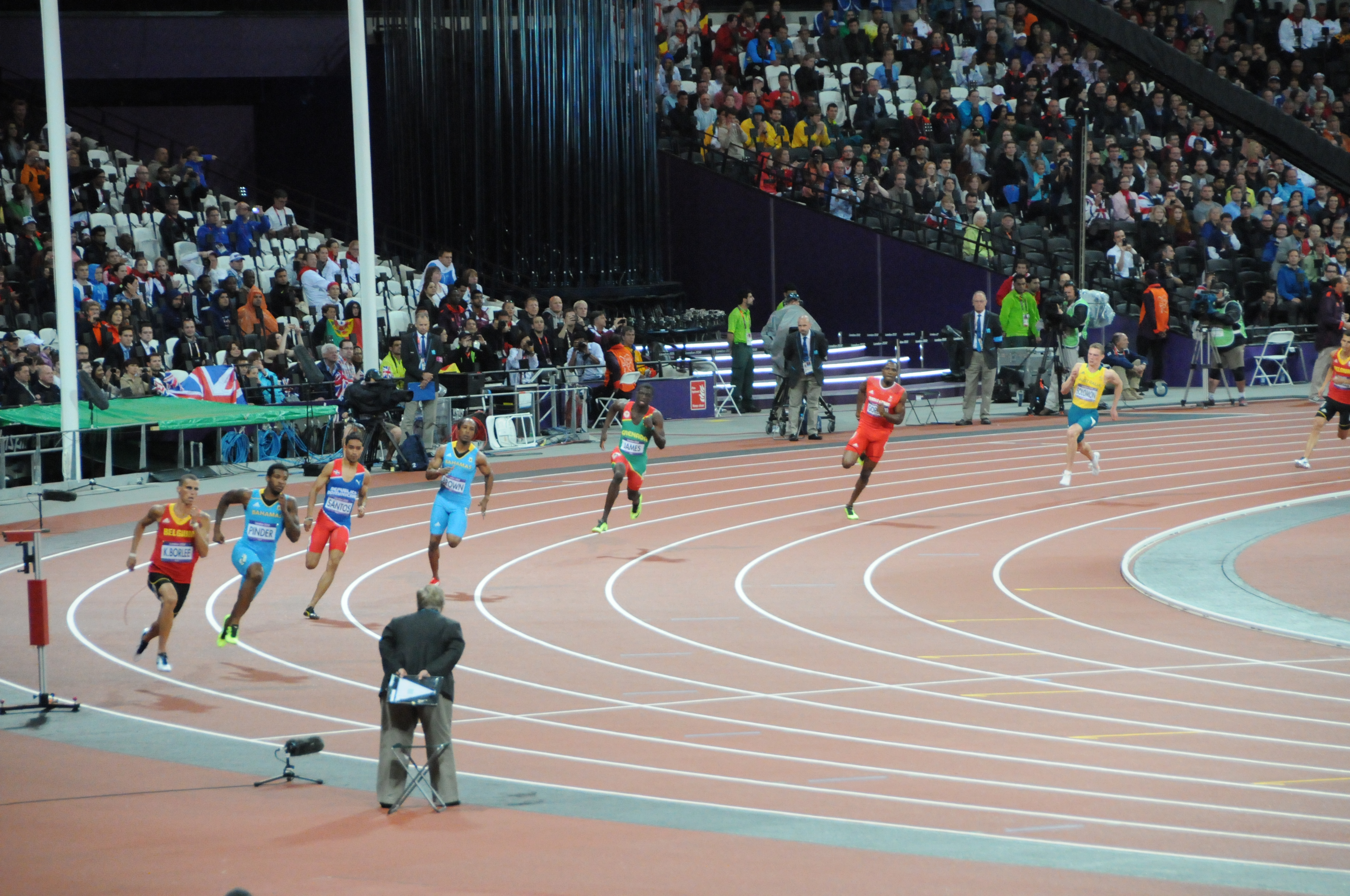 Finale du 400m hommes des jeux olympiques de Londres, 2012